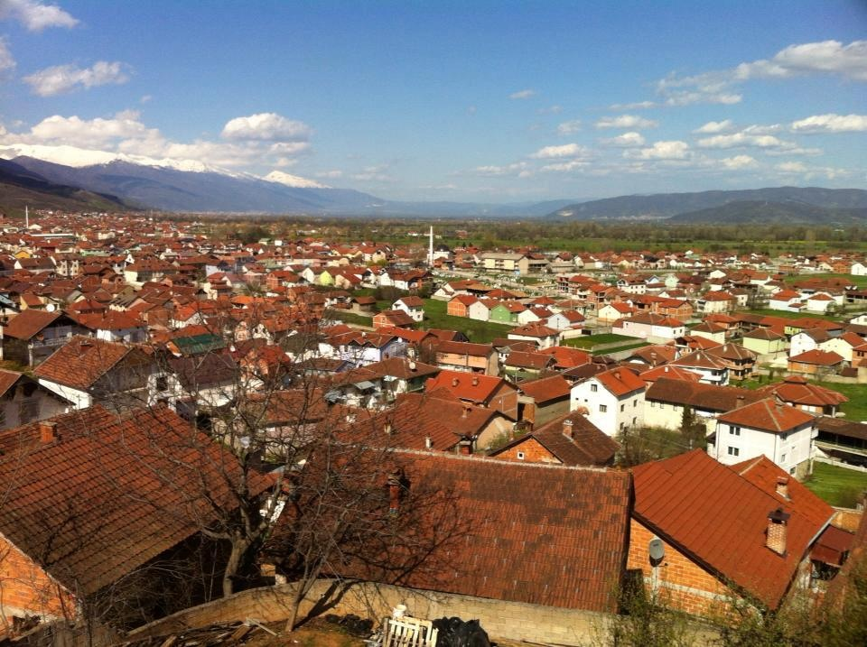 slika vasi dobridoll z hriba